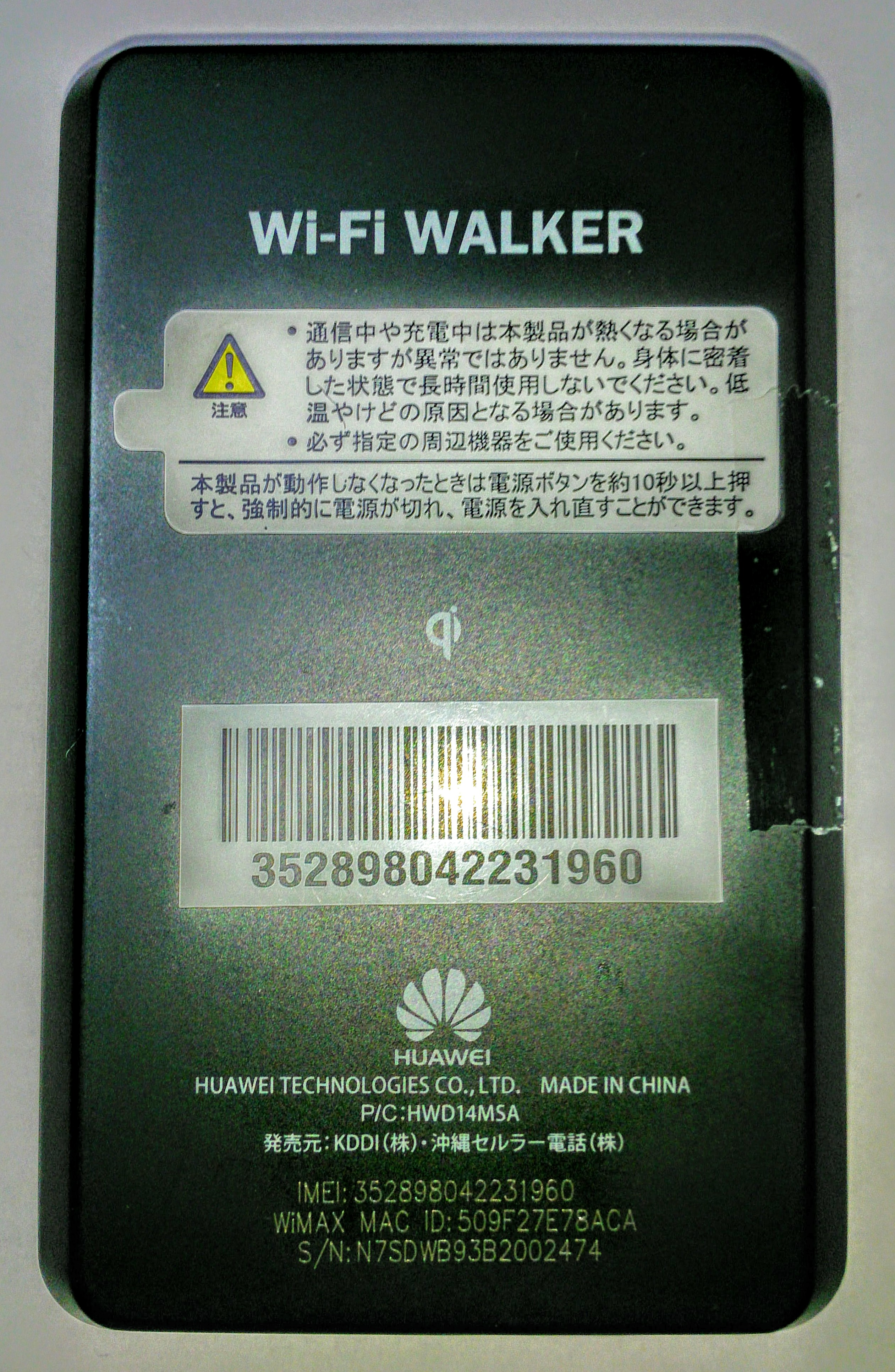 HWD14・シルバー